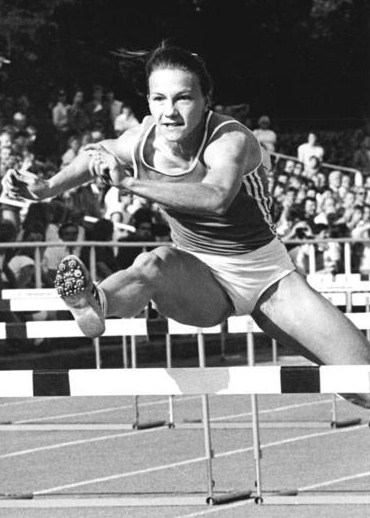 Gloria Siebert, Cornelia Oschkenat ADN-ZB Oberst 8.9.88 Potsdam: DVfL-Sportfest - Den 100-m-Hürdenlauf gewann Gloria Siebert (SC Cottbus) in 12,67 s vor Cornelia Oschkenat (SC Dynamo Berlin, l.).